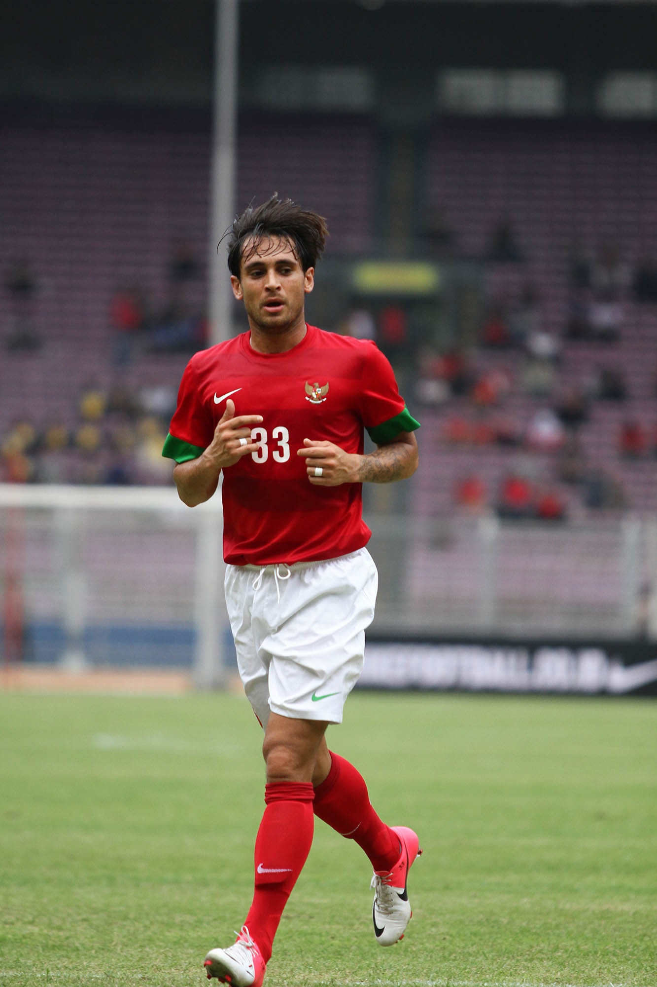 Timnas Indonesia - Timor Leste